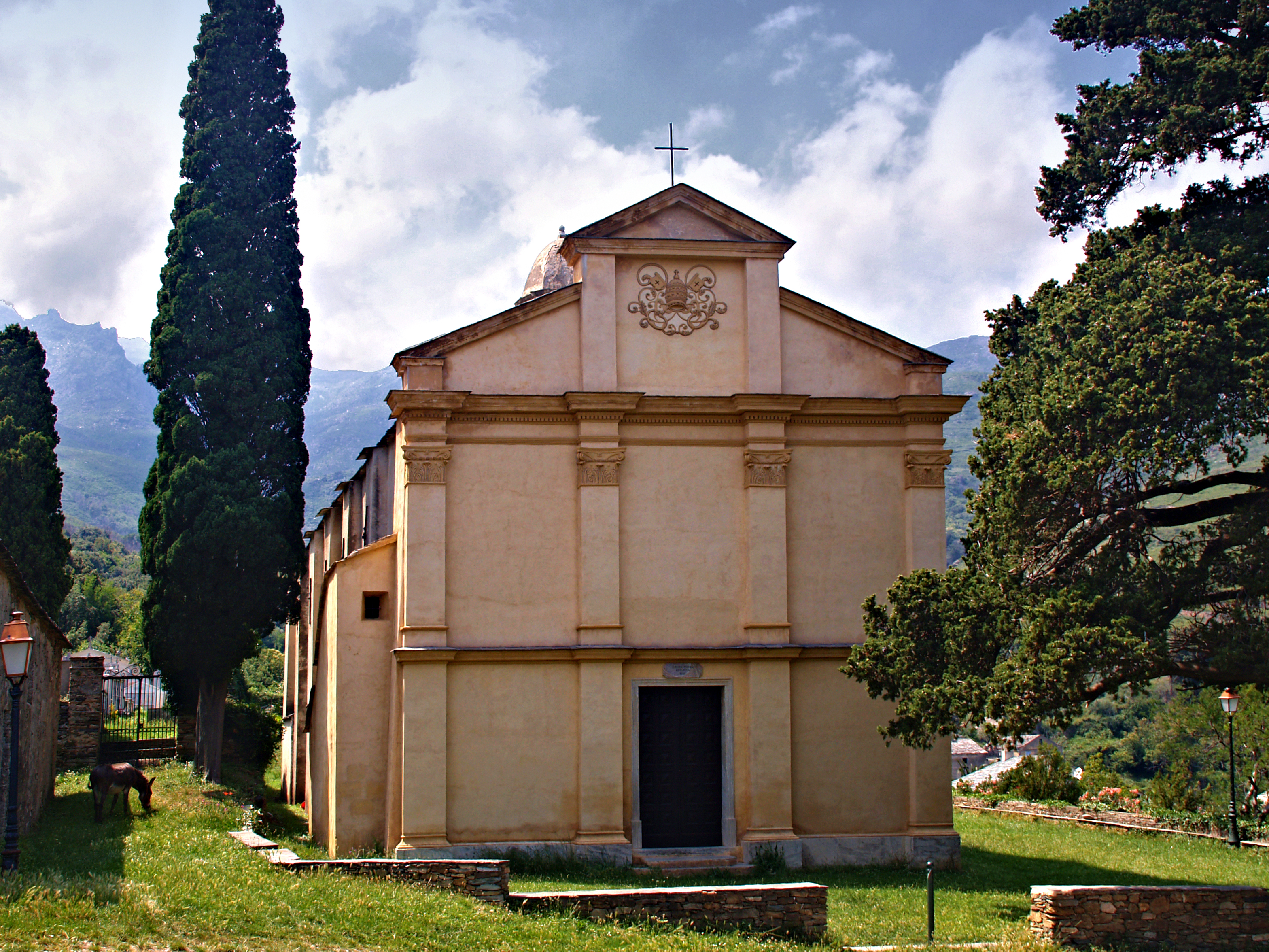 Corsu: Brandu, Cap Corse (Corsica) - Chjesa Santa Maria Assunta in piazza Parocchia di Castello